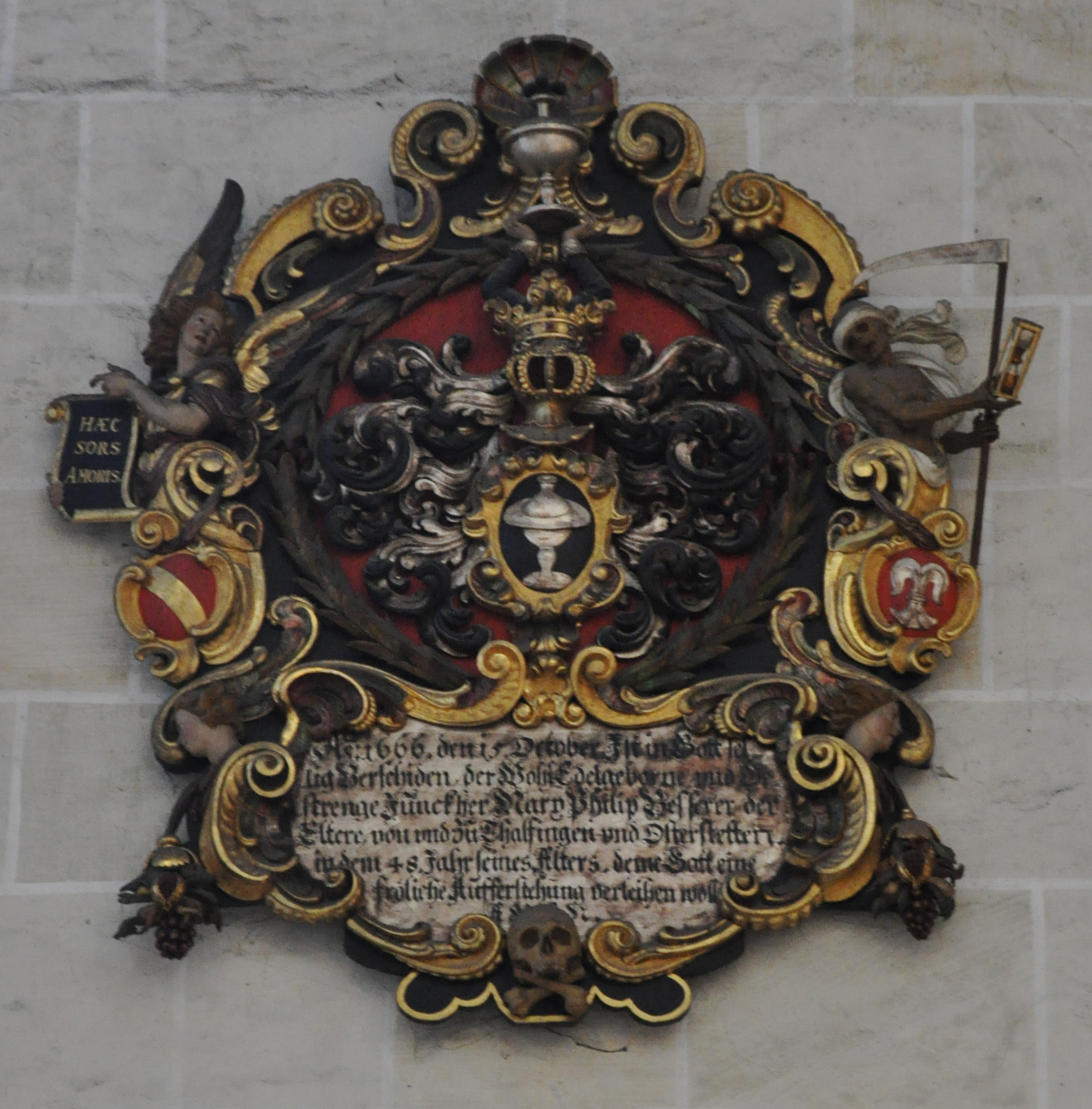 Ulm, Ulmer Münster, Totenschild Marx Philipp Besserer der Ältere († 15. Oktober 1666) Inschrift: "A: 1666, den 15. October Ist in Gott selig Verschiden, der WohlEdelgeborne vnd Gestrenge Junckher Marx Philipp Besserer der Eltere, von vnd zu Thalfingen vnd Osterstetten, in dem 48. Jahr seines Alters, deme Gott eine fröliche Aufferstehung verleihen woll. AMEN."; weitere Inschrift: "HAEC SORS AMORIS" Wappen: Besserer, Beiwappen: Krafft und Welser